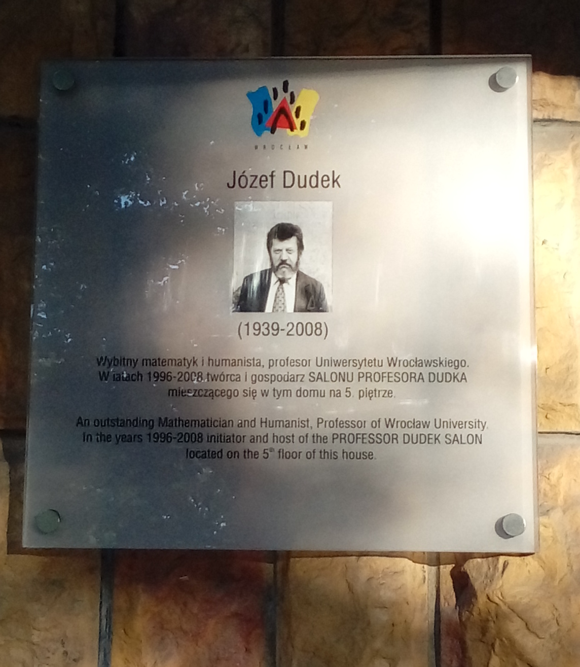 Tablica pamiątkowa ku czci profesora Józefa Dudka, Wrocław, ul. Pasteura 17A